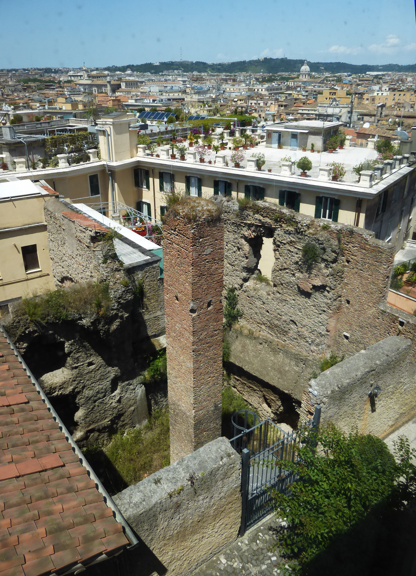 Roma, resti del tempio di Serapide dalla vetrata delle Scuderie del Quirinale.